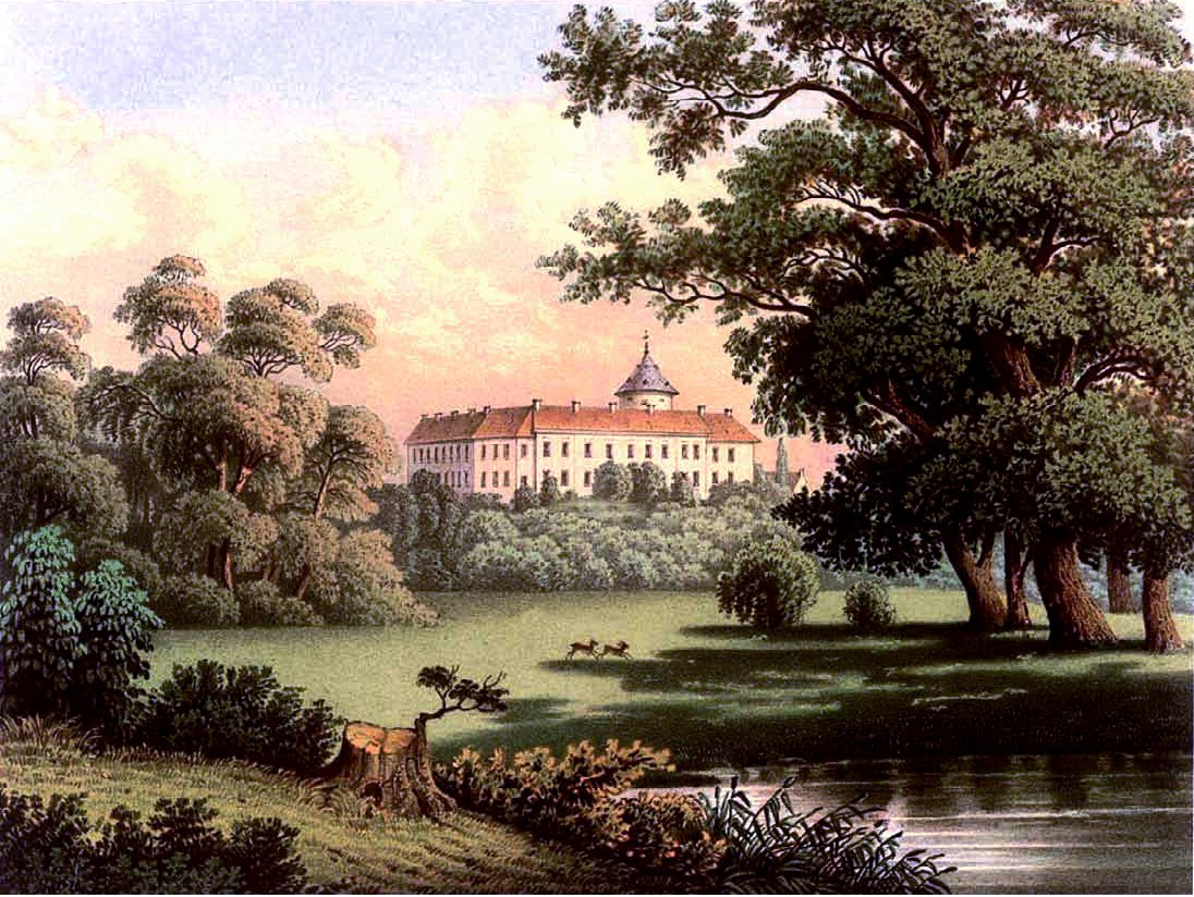 Schloss Wiesenburg, Kreis Zauch-Belzig, Provinz Brandenburg, Lithografie aus dem 19. Jahrhundert